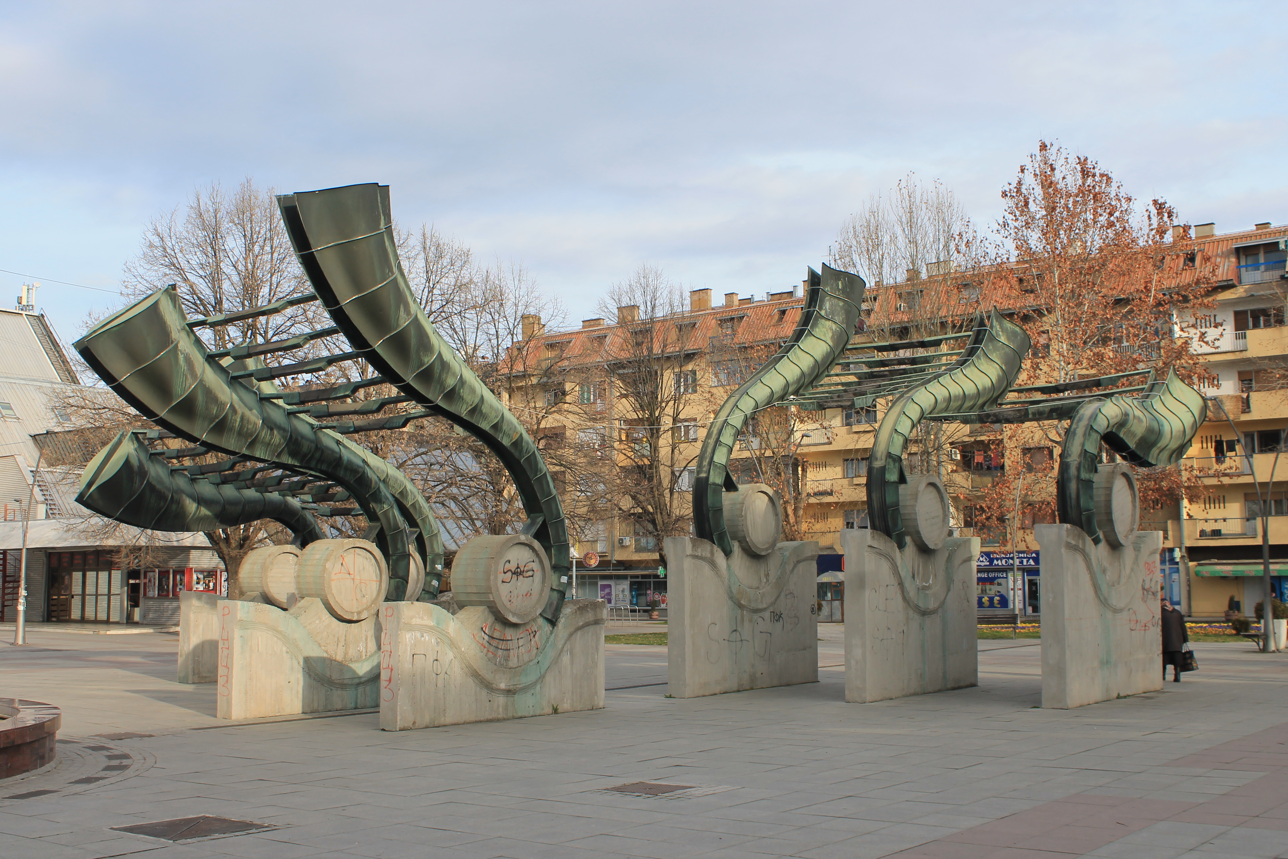 Spomenik Revoluciji, Ruma